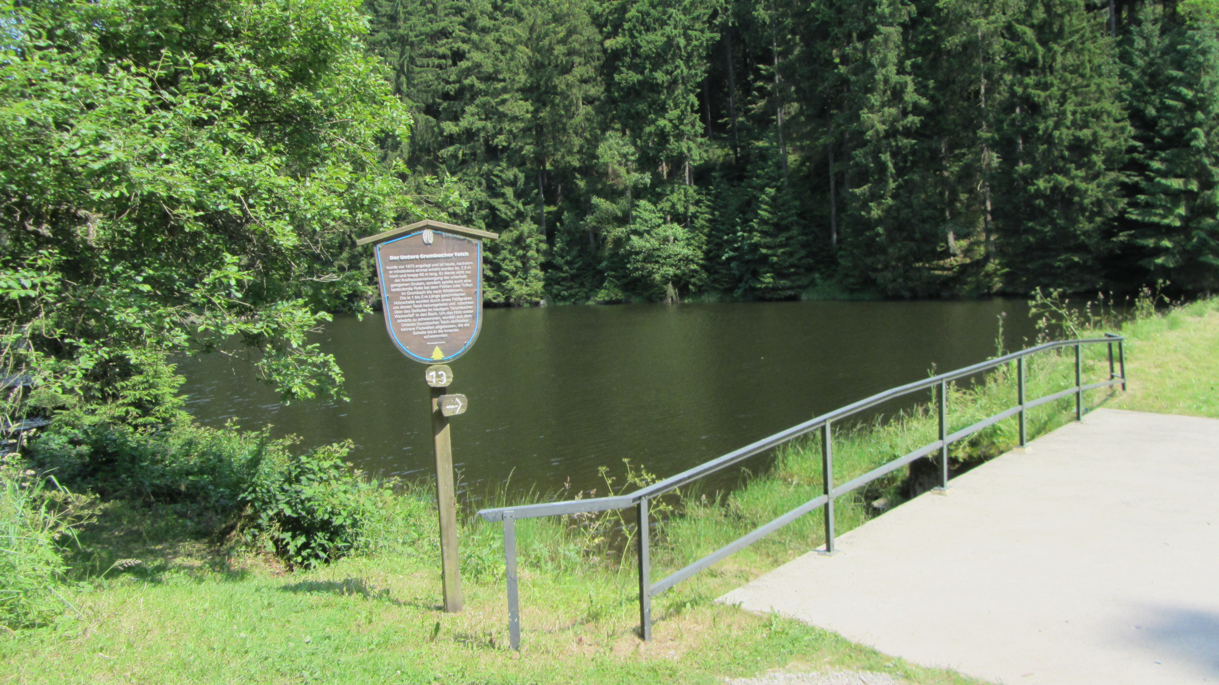 Unterer Grumbacher Teich zwischen Wildemann und Lautenthal